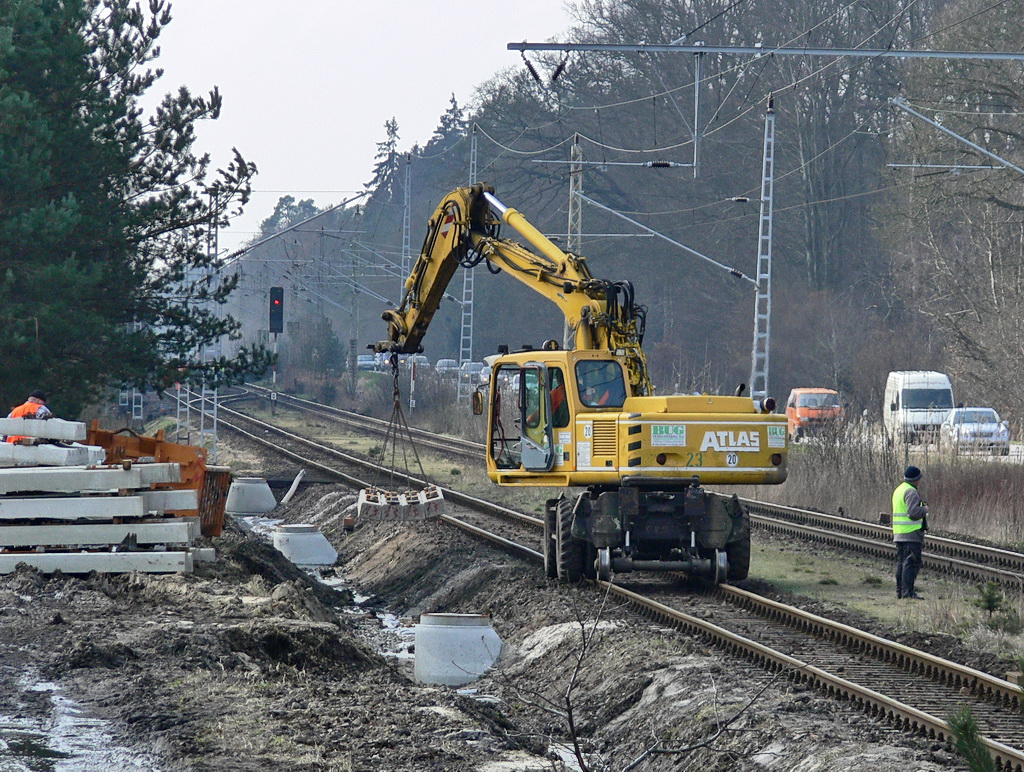 Vorbereitende Bauarbeiten im Bahnhof Gelbensande zur Verlegung neuer Gleise.